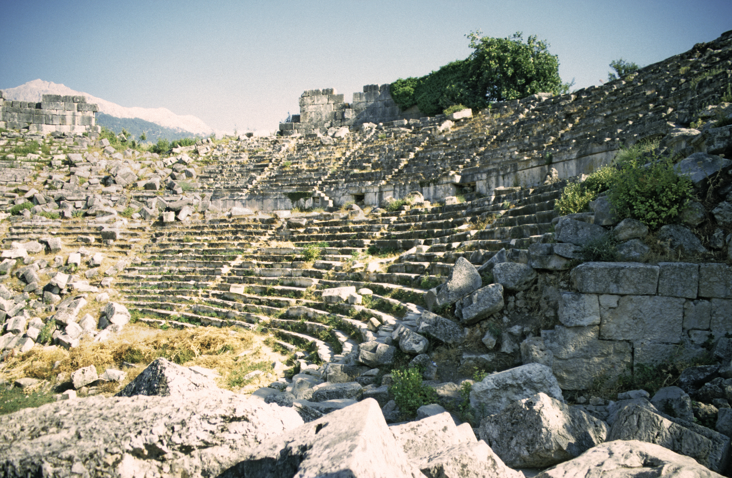 Tlos, Südwesttürkei, Theater